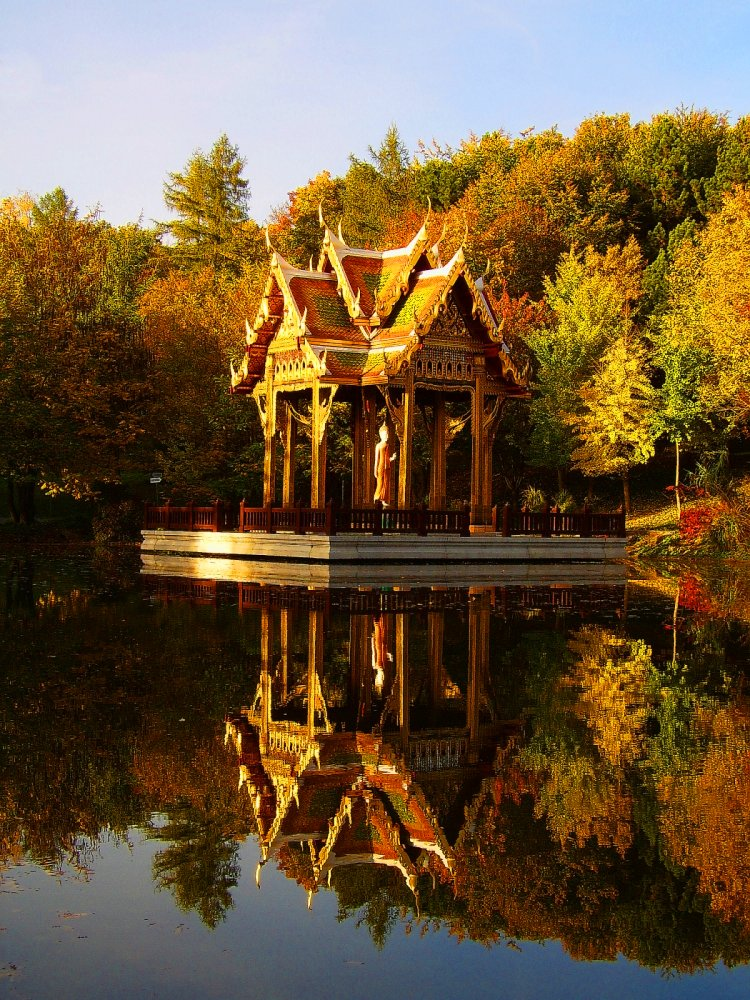 Autum at Sala Thai Pagoda in Munich Westpark